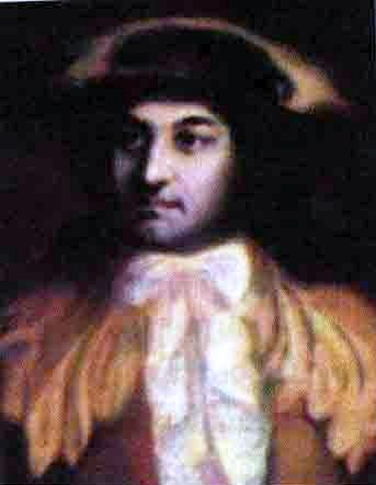 Деятель армянского национально-освободительного движения Исраэл Ори (1659-1711)